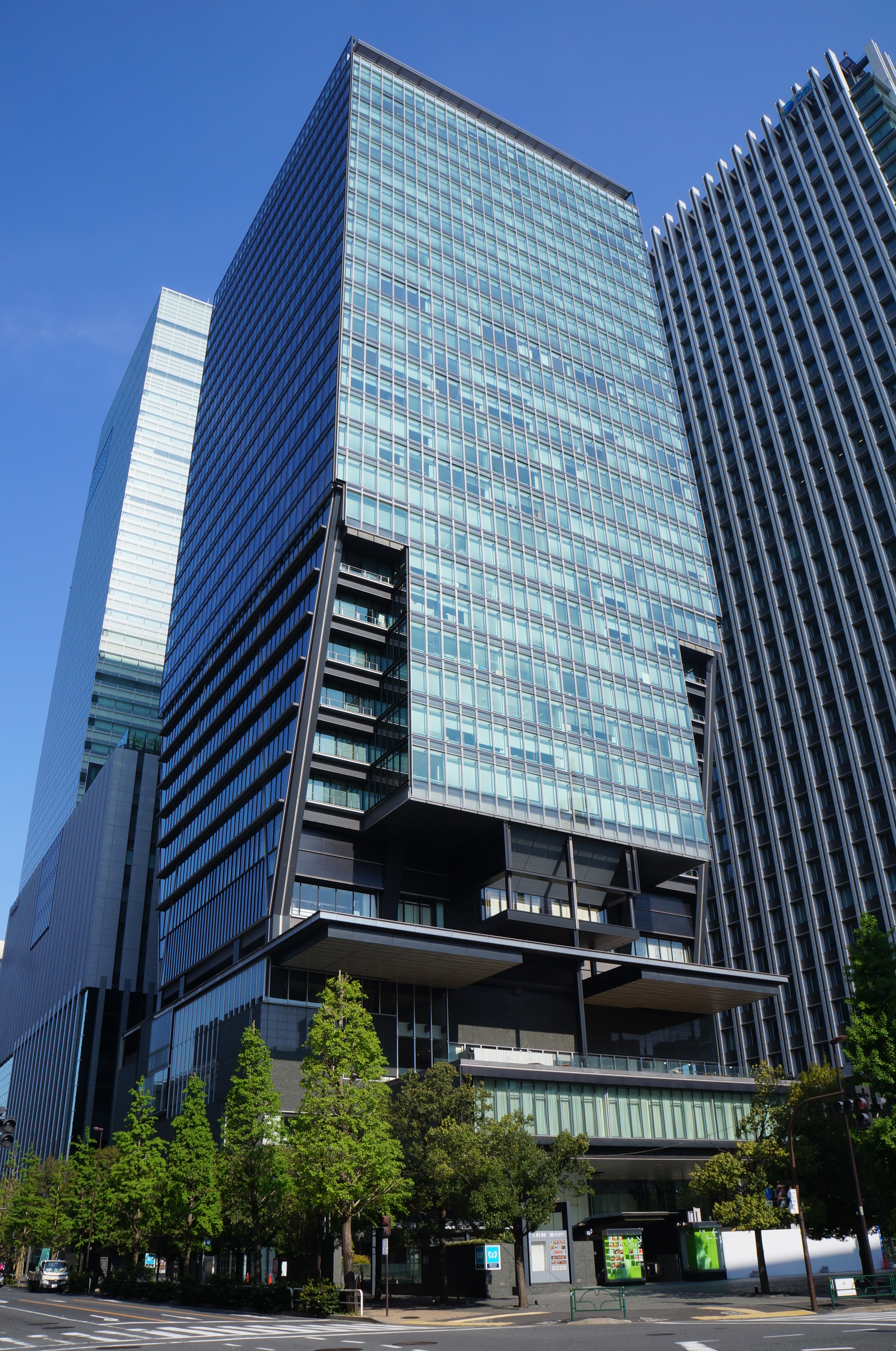 東京サンケイビル（東京都千代田区）